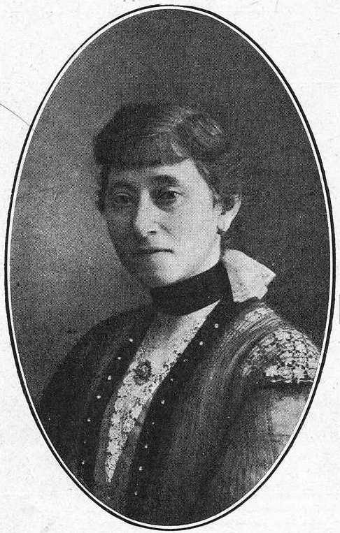 Francisca Herrera Garrido, fotografía en Vida Gallega 1920